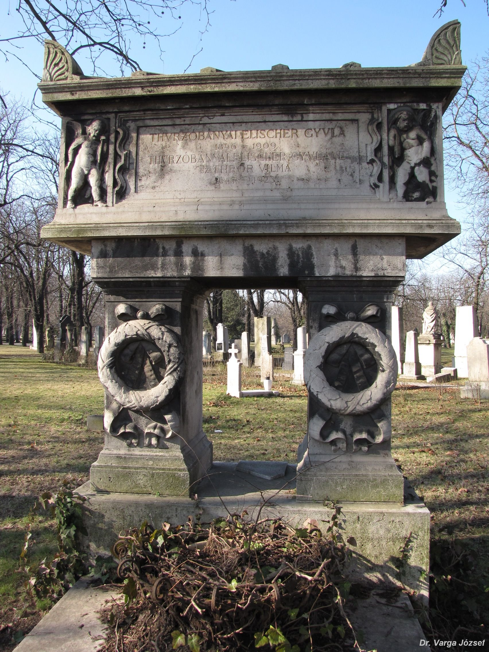 Elischer Gyula (Eperjes, 1846. október 15. – Budapest, 1909. szeptember 28.) nőgyógyász sírja Budapesten. Kerepesi temető: 17/1-1-9